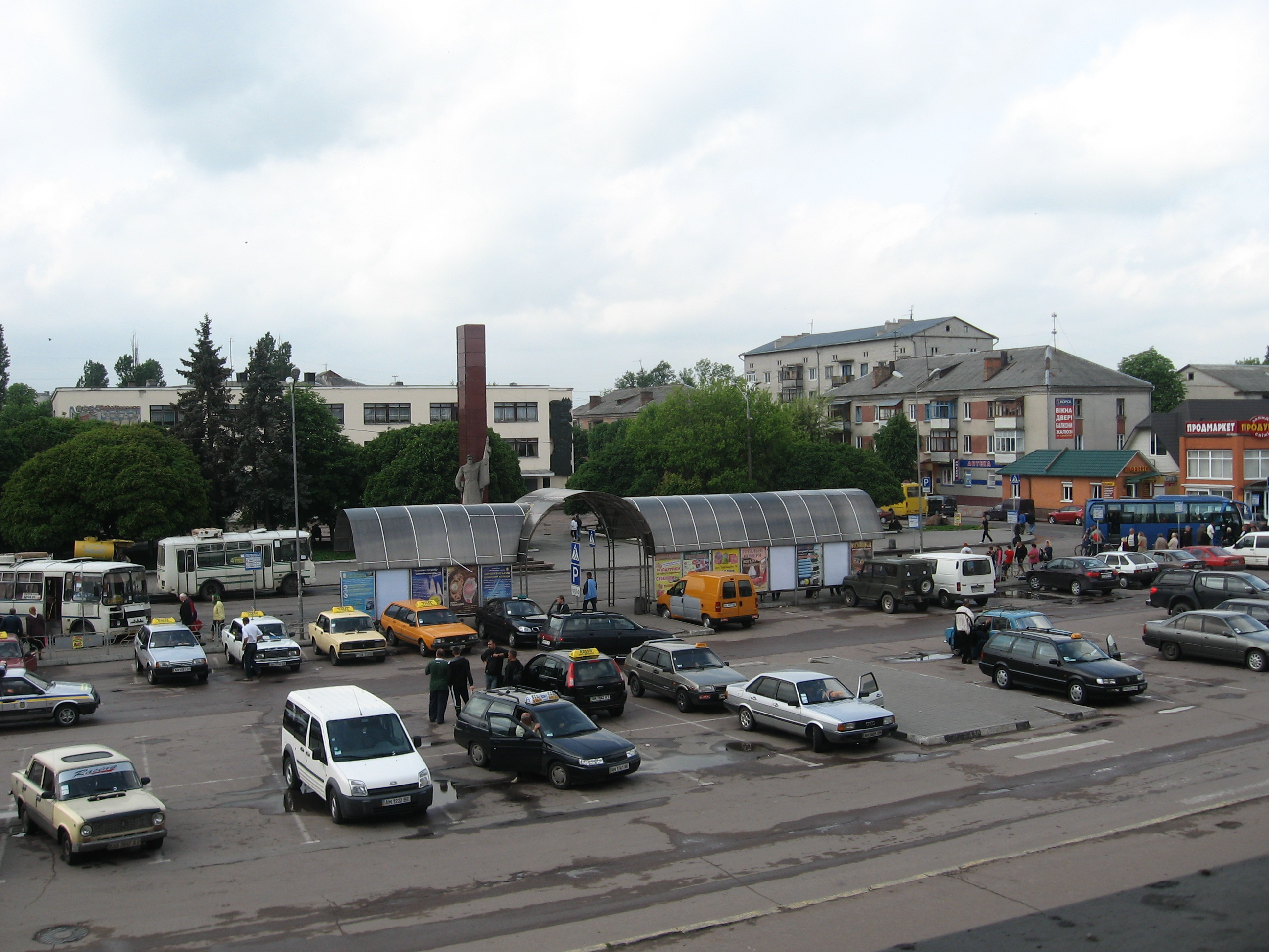 Коростень , площадь перед ж/д вокзалом